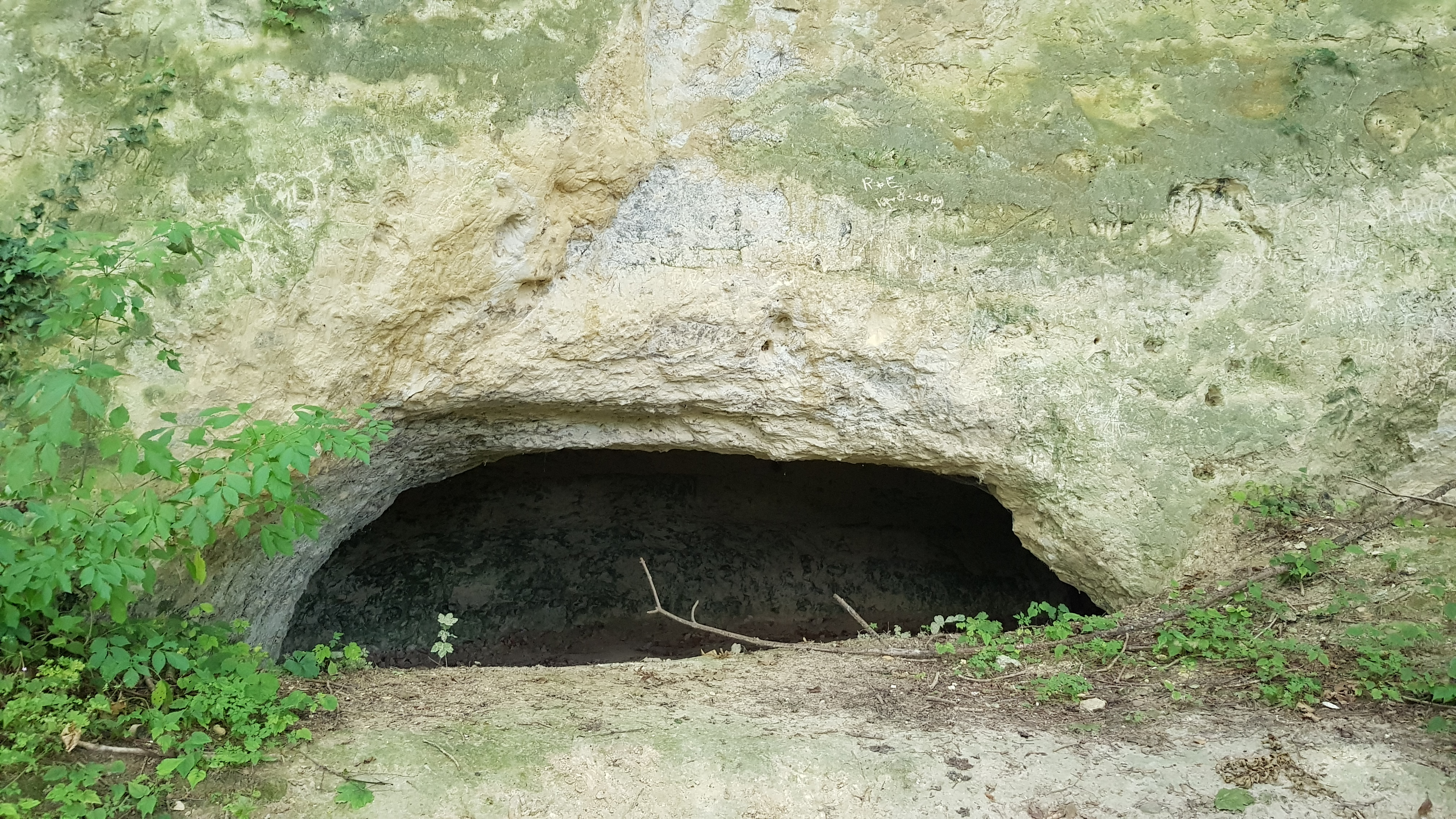 Cadierdalgroeve III, Cadier en Keer, Eijsden-Margraten, Limburg, Nederland